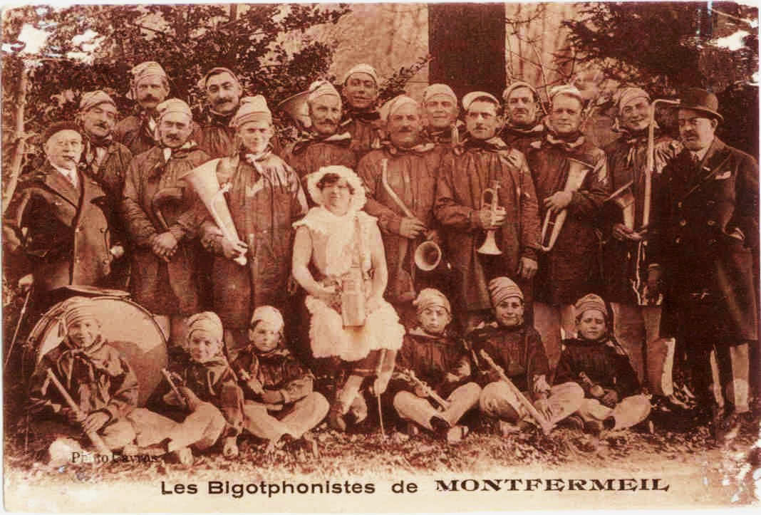 Les bigophonistes de Montfermeil.